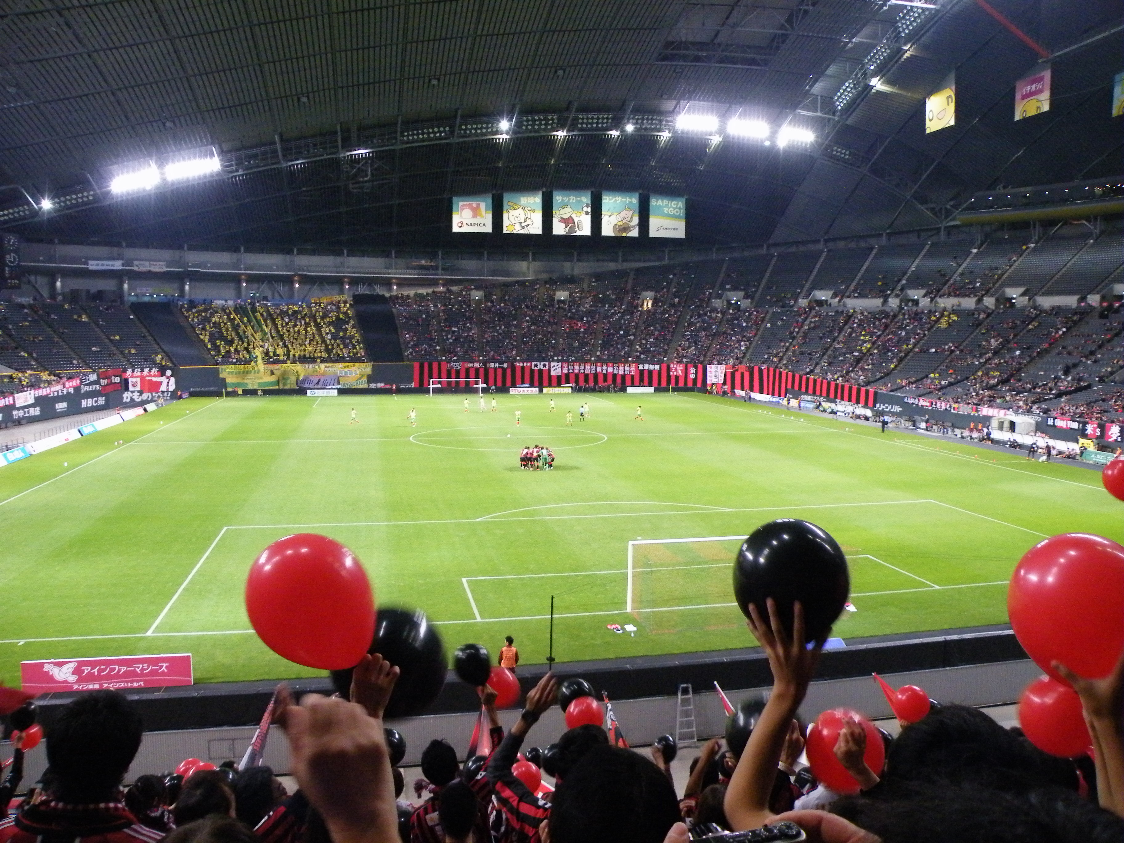 札幌ドーム、Jリーグ ディビジョン2 第39節11月3日(日) コンサドーレ札幌 vs ジェフユナイテッド千葉